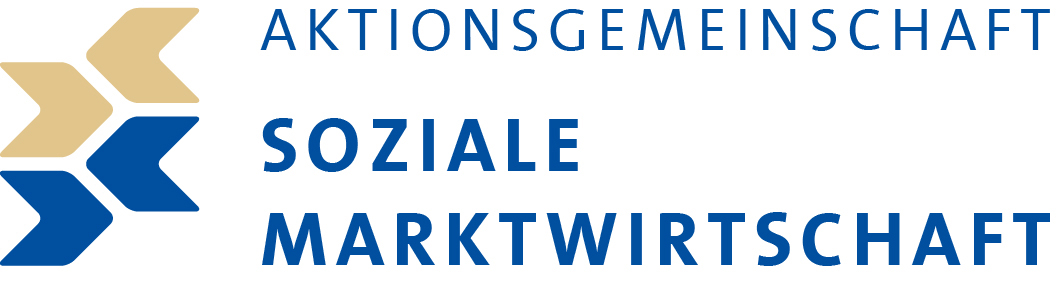 Logo der Aktionsgemeinschaft Soziale Marktwirtschaft e.V. (Tübingen, gegründet 1953)